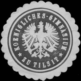 Sealing stamp Title: K. Gymnasium zu Tilsit Description: schwarz, weiß, geprägt Place: Tilsit size: 3 cm